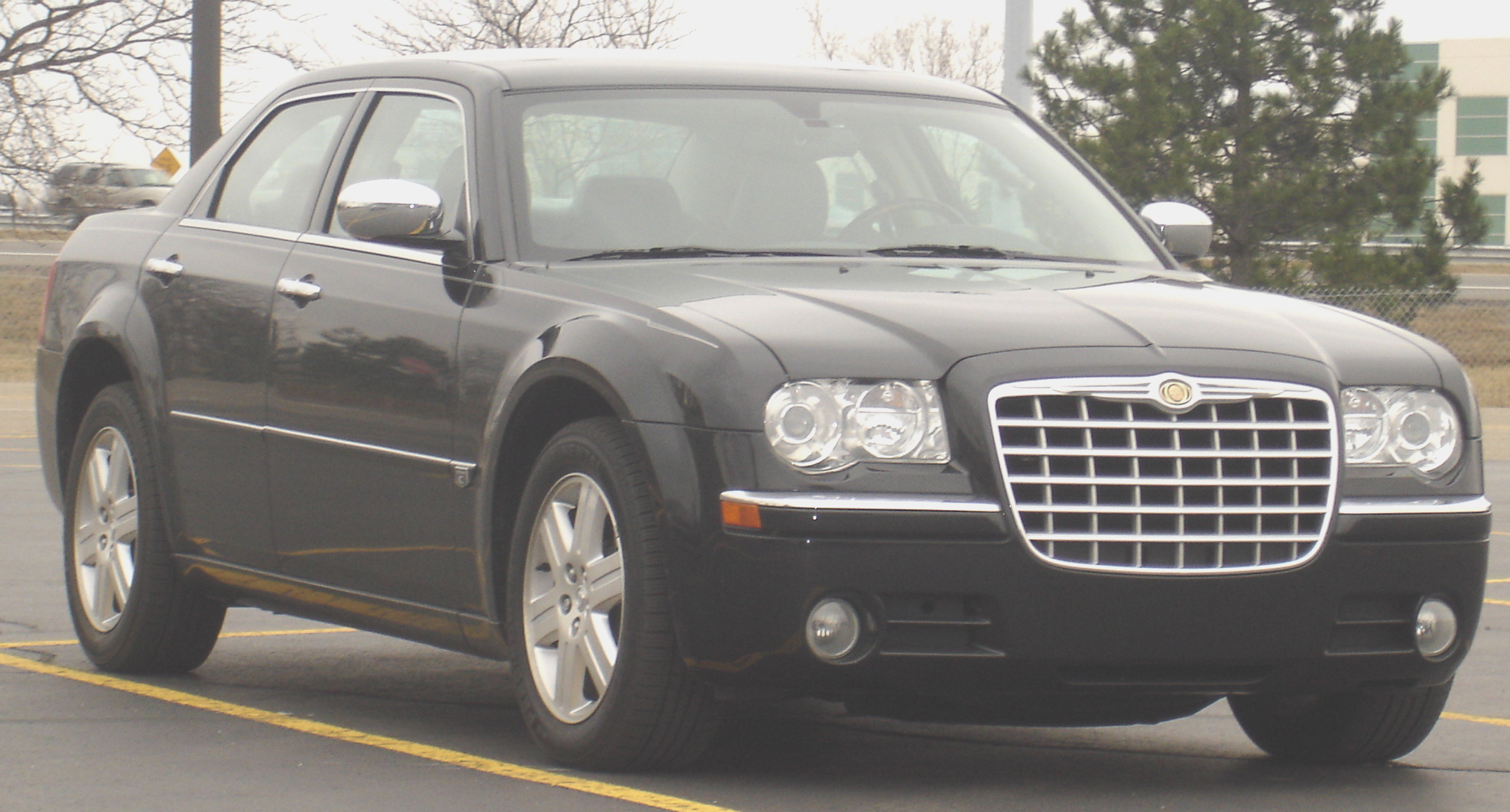 2006 Chrysler 300